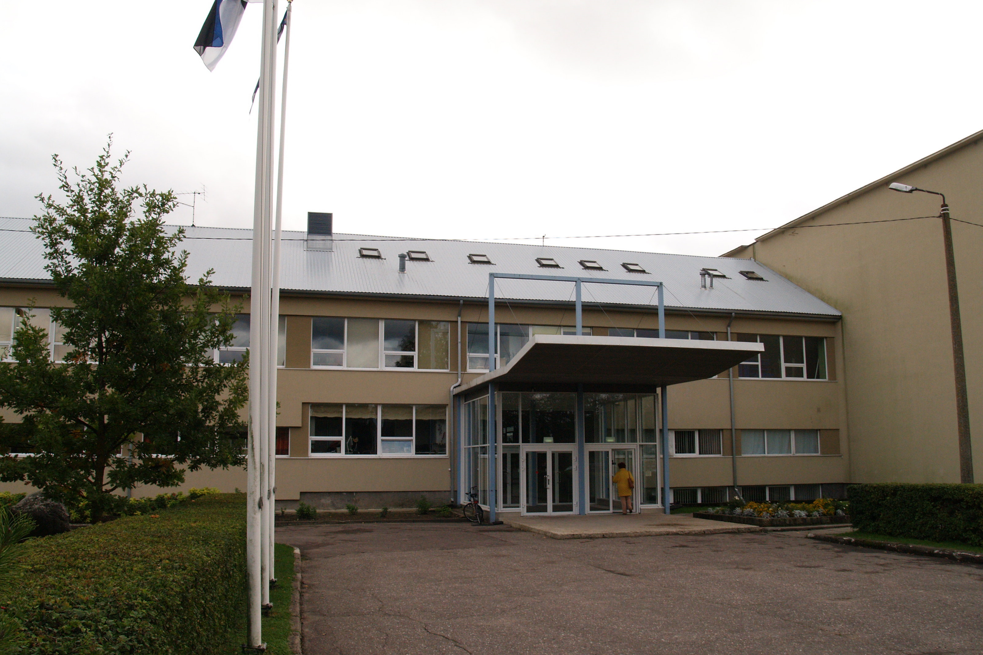 Kuressaare Gümnaasium